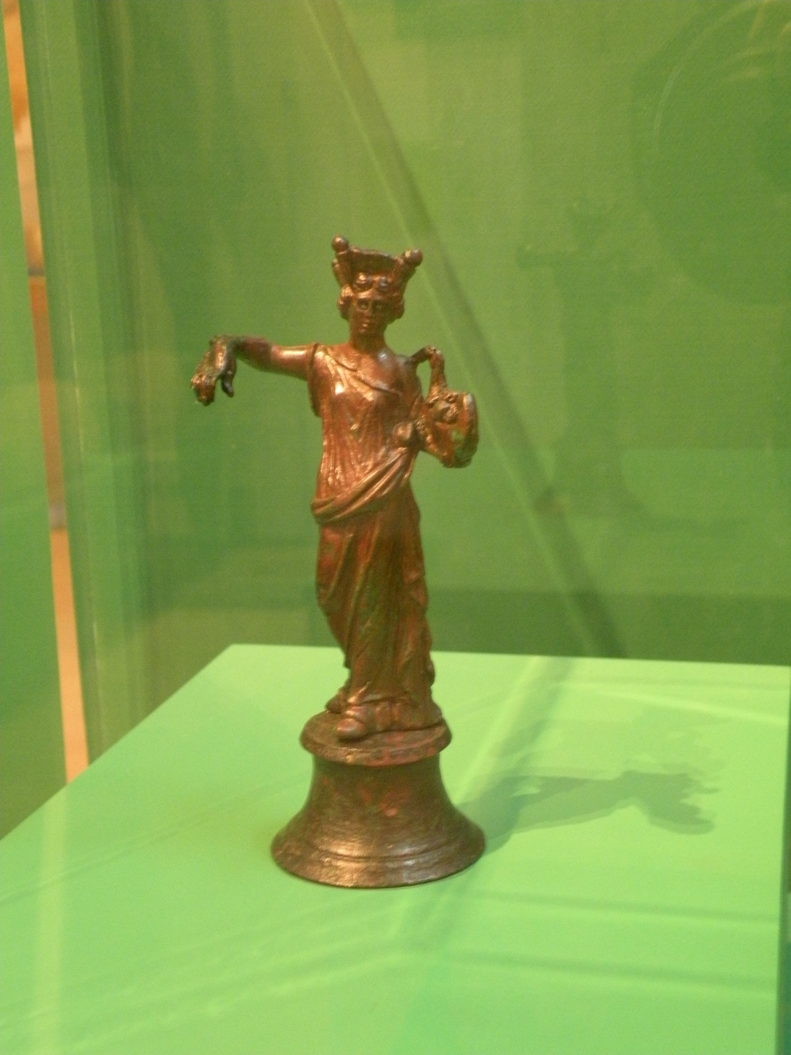 Deesse tutela en bronze trouvé à Gonesse en bronze et yeux en argent époque gallo-romaine